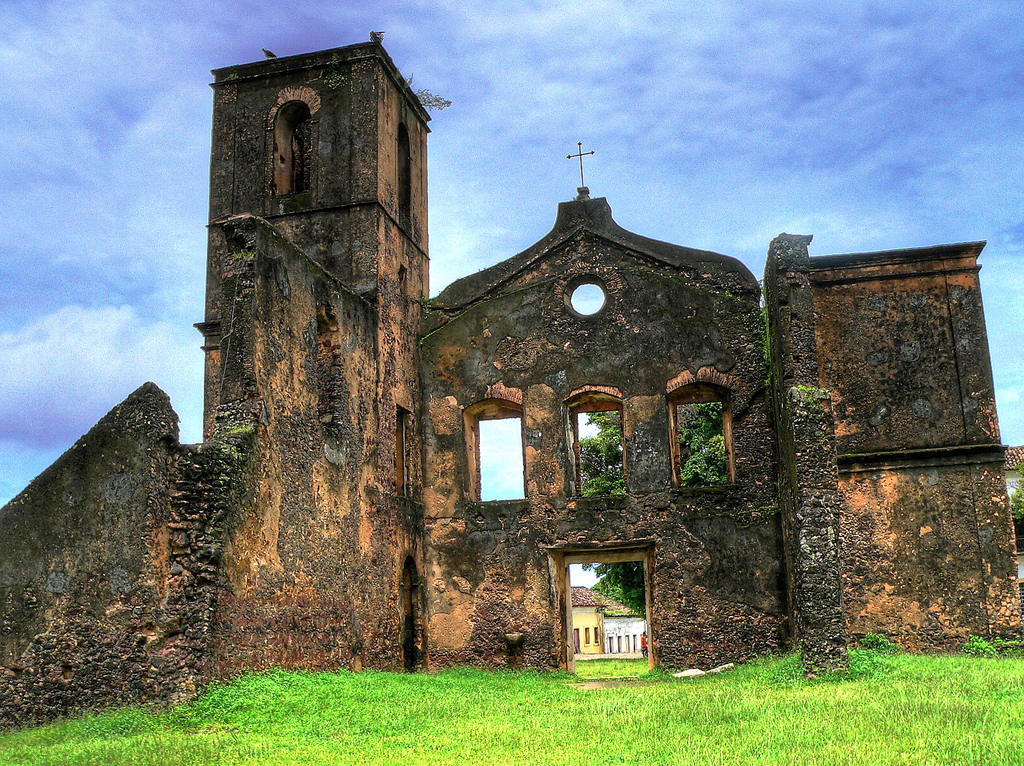 Ruínas da Igreja dos Jesuítas em Alcântara (Maranhão)